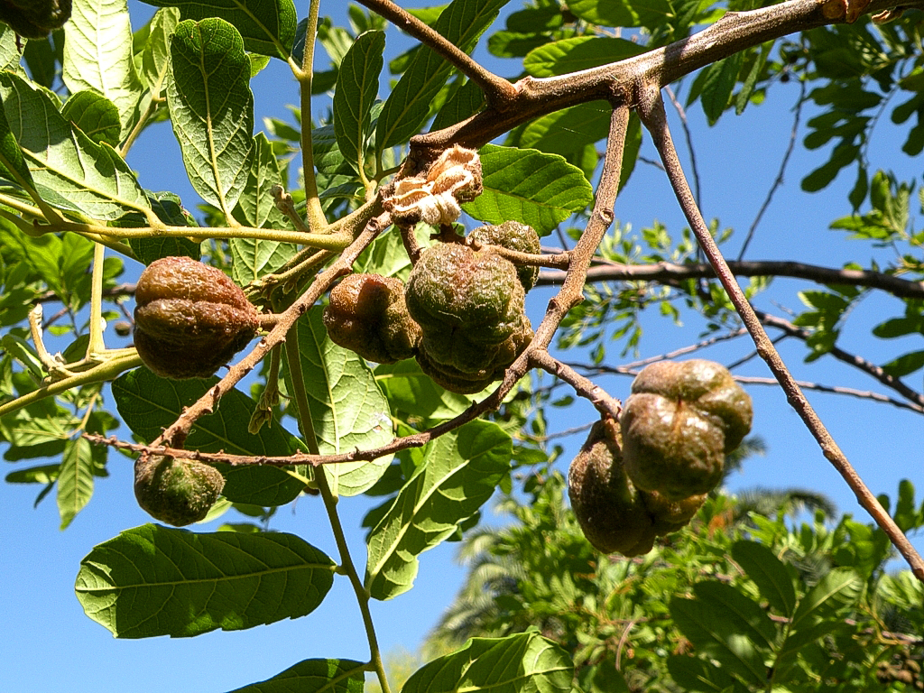 Foto tomada en Arboretum de Montevideo